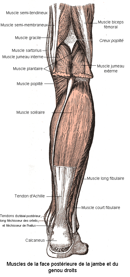 Muscles de la face postérieure de la jambe et du genou. Anatomie humaine